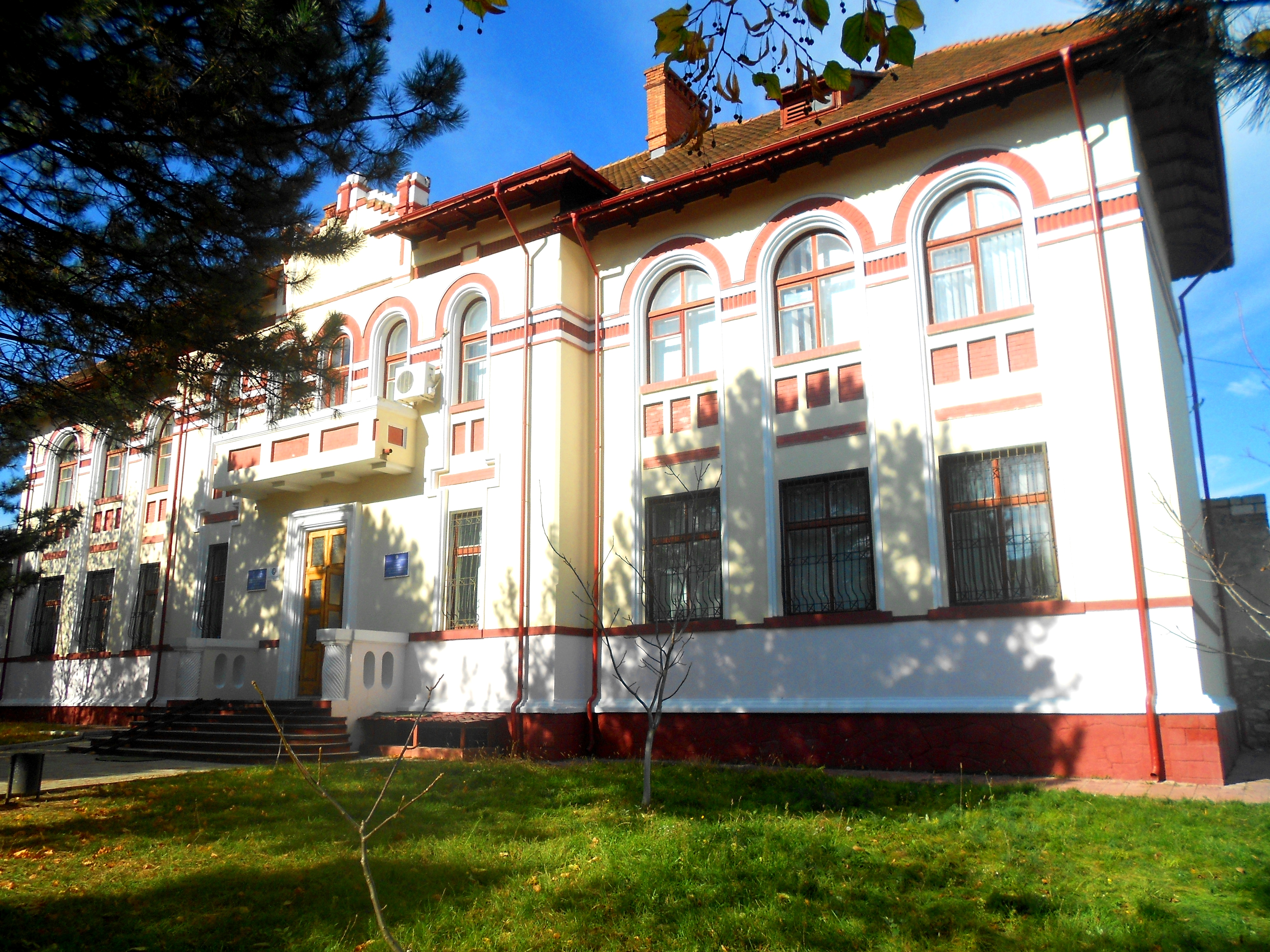 Centrul de Creaţie pentru Copii şi Tineret din Fălești